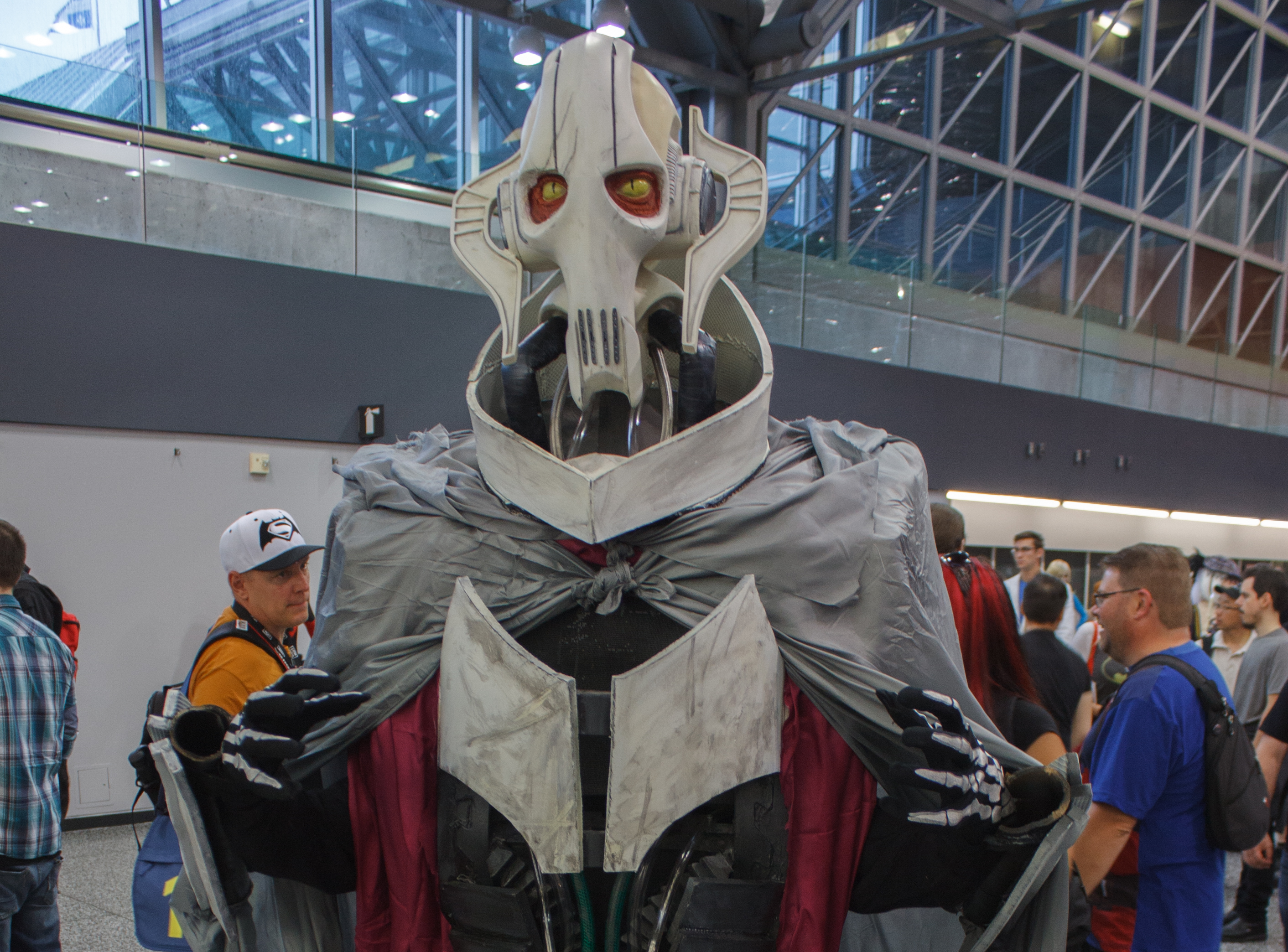 General Grievous cropped